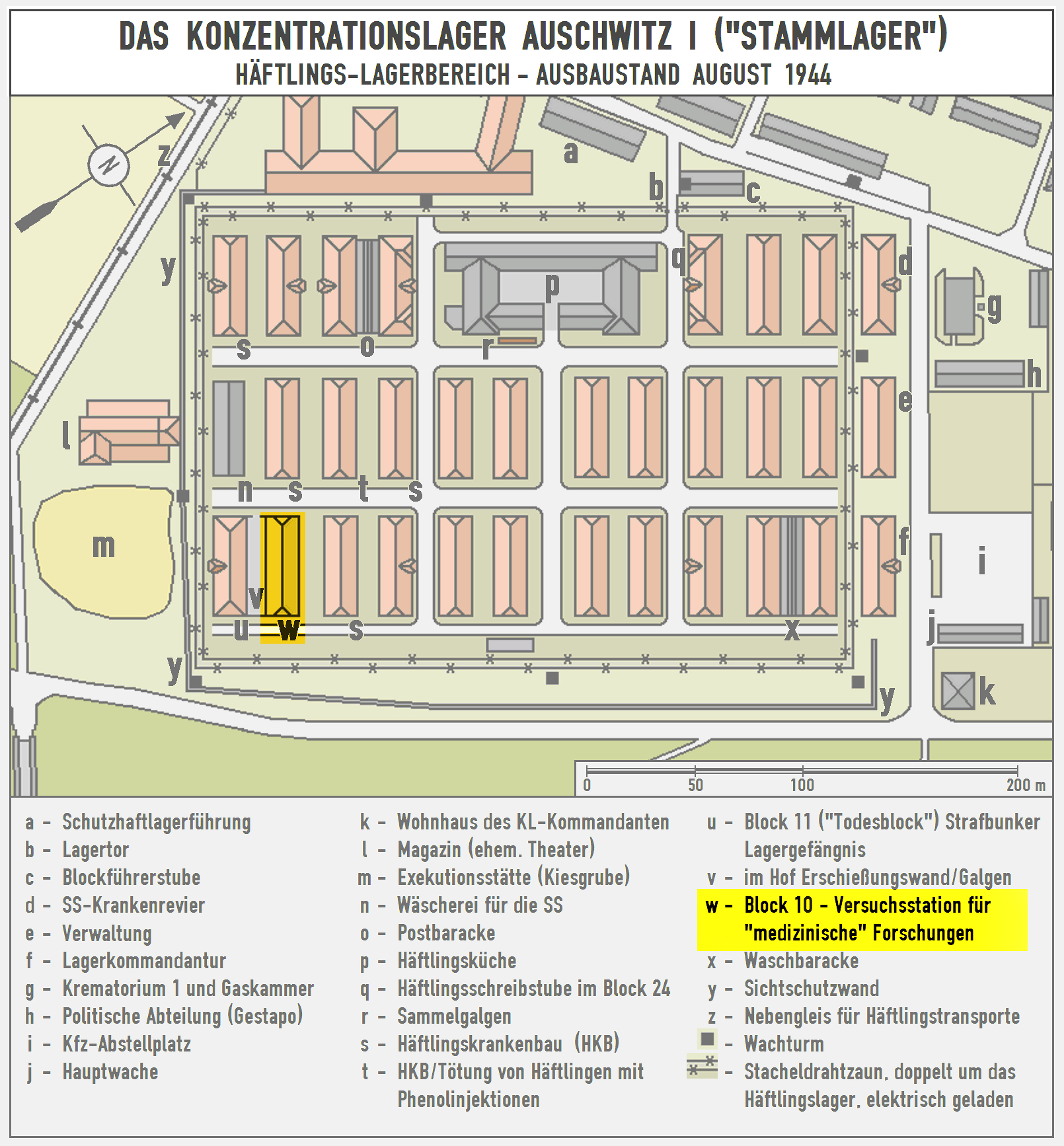 Der Plan zeigt das Konzentrations- und Vernichtungslager Auschwitz I (Stammlager) im Ausbaustand vom August 1944.